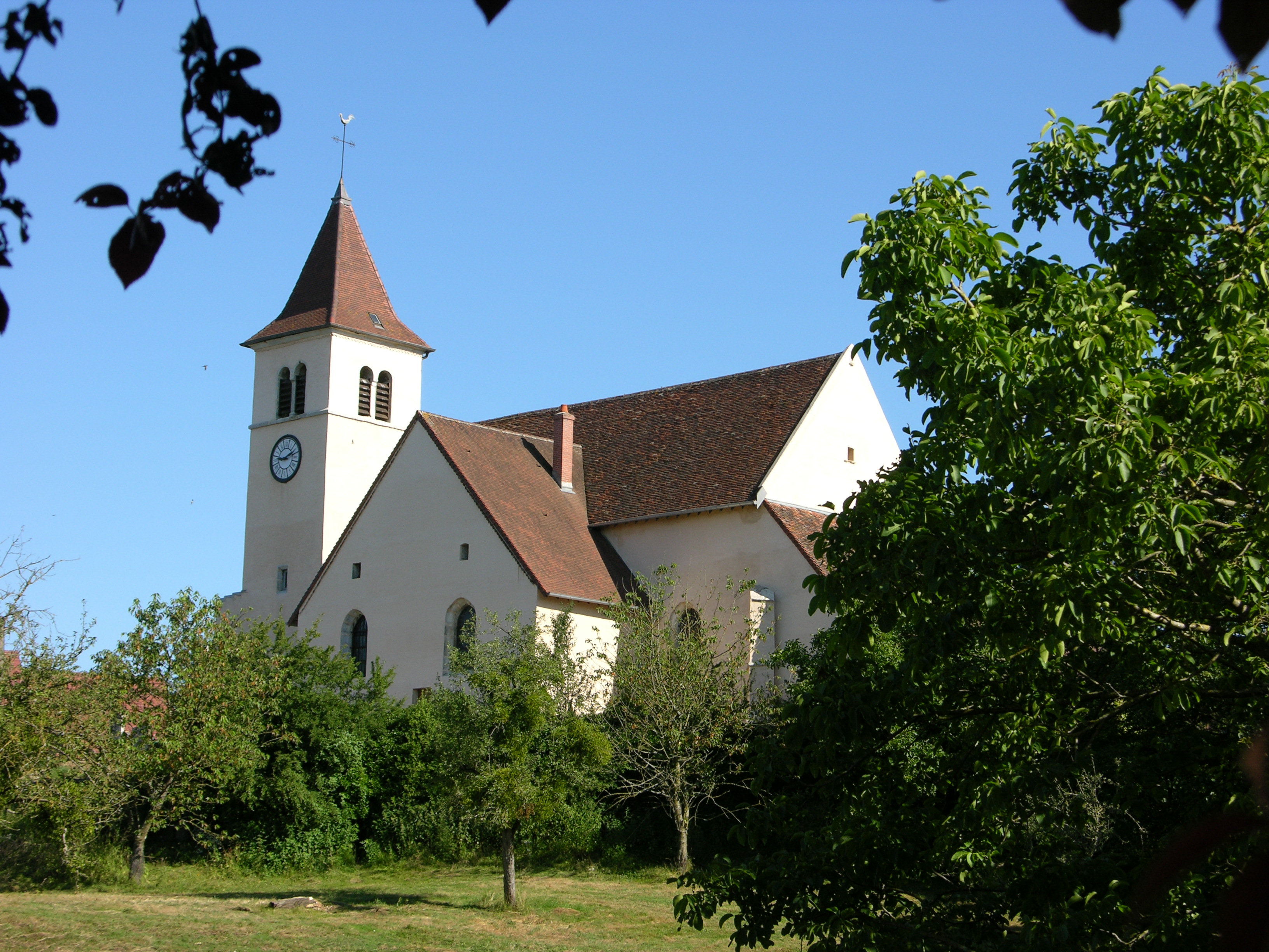 L'église de Santans.